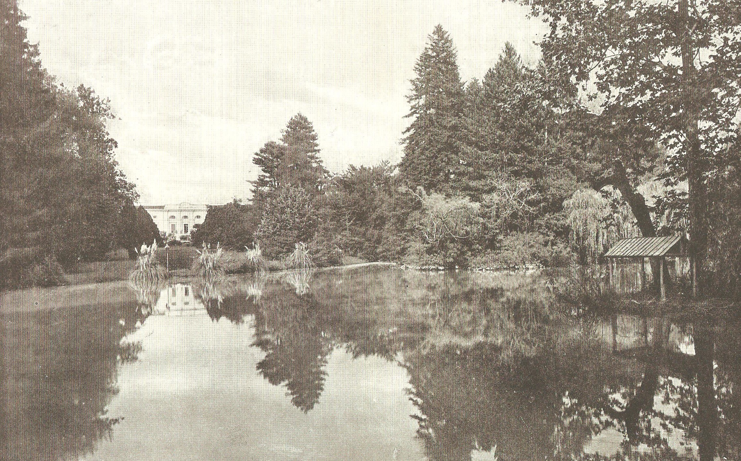 Villa Franco-Lebrecht, veduta del parco con il laghetto, ora non più esistente, in una foto del 1920 circa (da Vittorio Cicala, Ville Venete, Casa Editrice Itala Ars, Torino 1924).